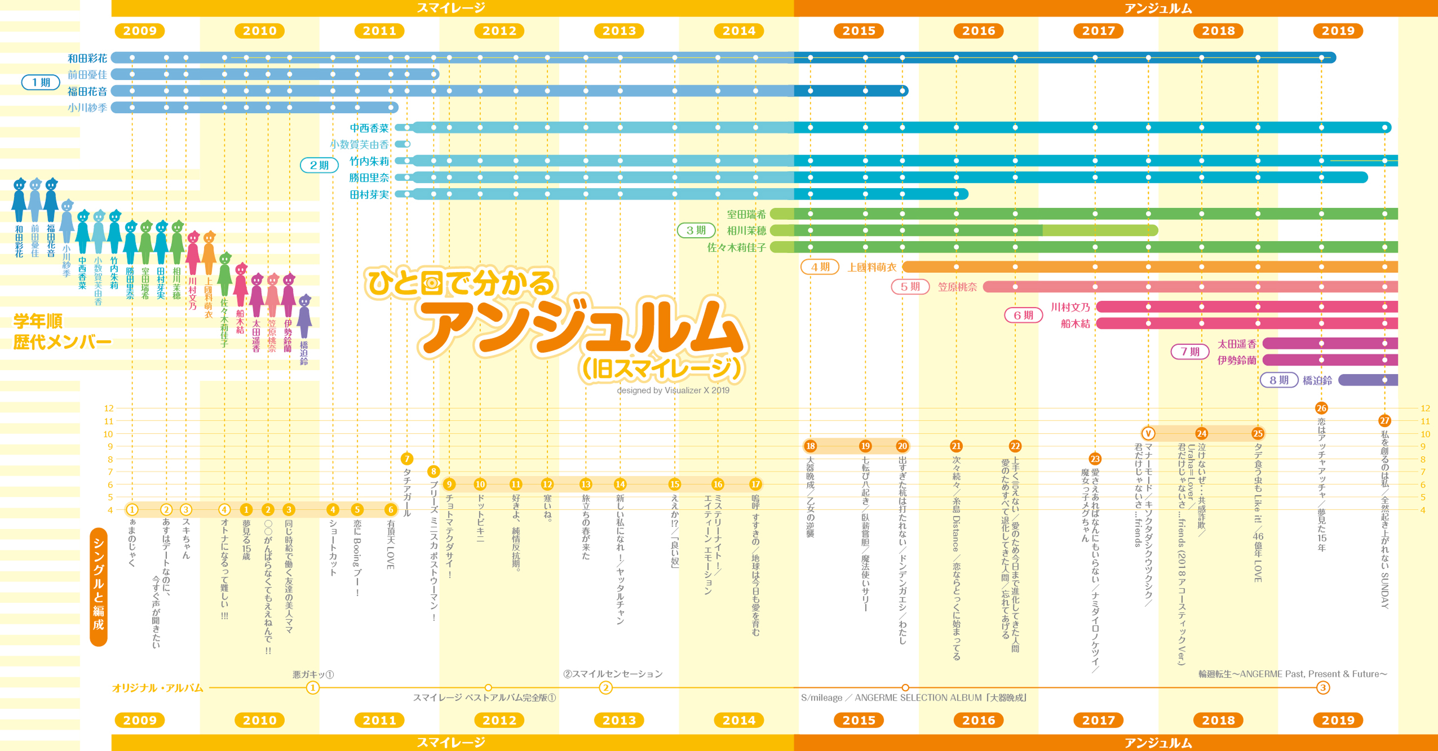 アイドルグループ「アンジュルム」のメンバーとシングル編成の変遷